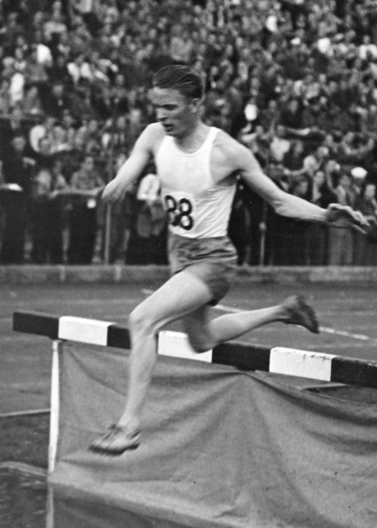 Lars Larsson (athlete)